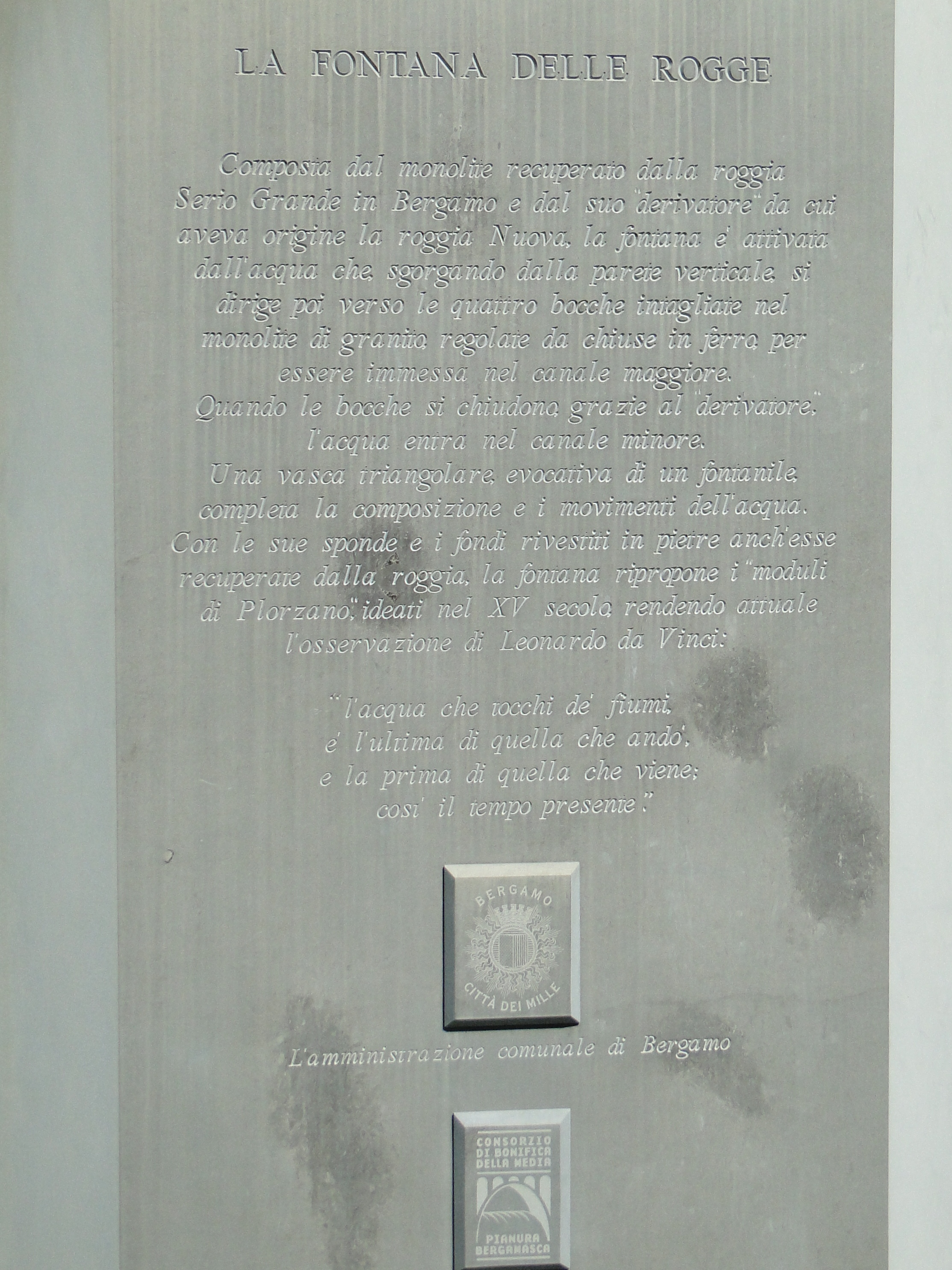 Fontana delle rogge, parco Suardi (Bergamo), descrizione